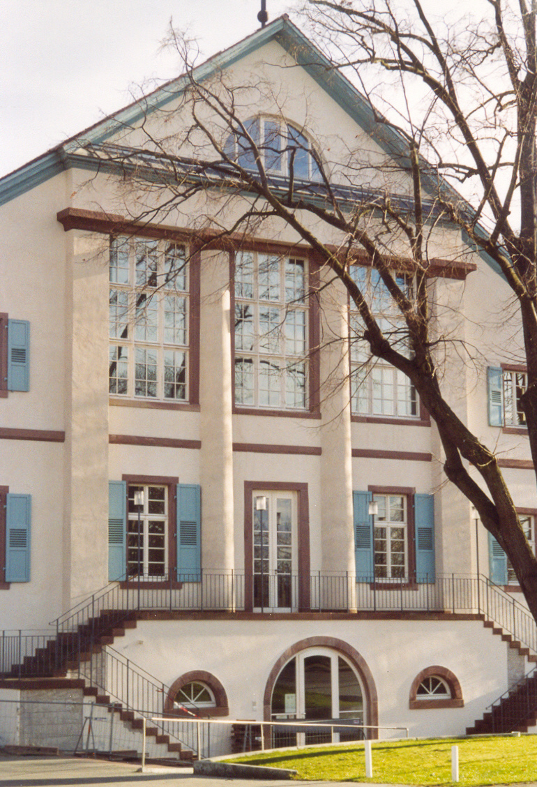 Karlsruhe : Vorderseite Stephanienbad. Erbaut 1811 beeindruckt die kraftvolle, wuchtige Wirkung, die originelle Interpretation eines Säulen-Portikus. Heute Gemeindezentrum der Paul-Gerhardt-Gemeinde.